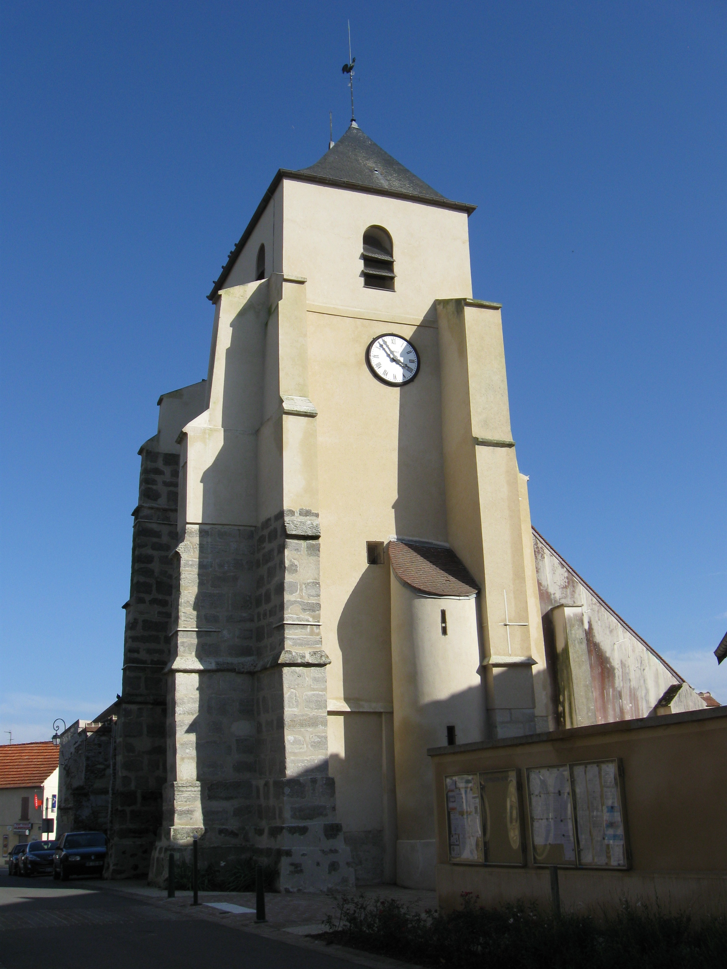 Église Saint-Georges de Monthyon. (Seine-et-Marne, région Île-de-France).